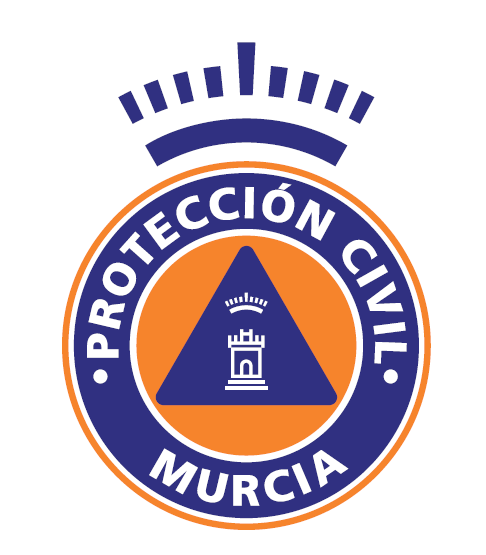 Es el logo oficial de la AVPC